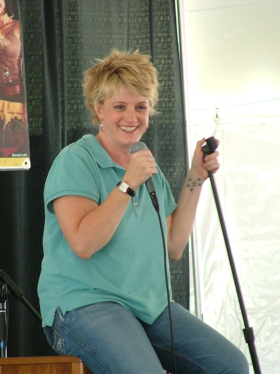 Comedienne Suzanne Westenhoefer on stage.